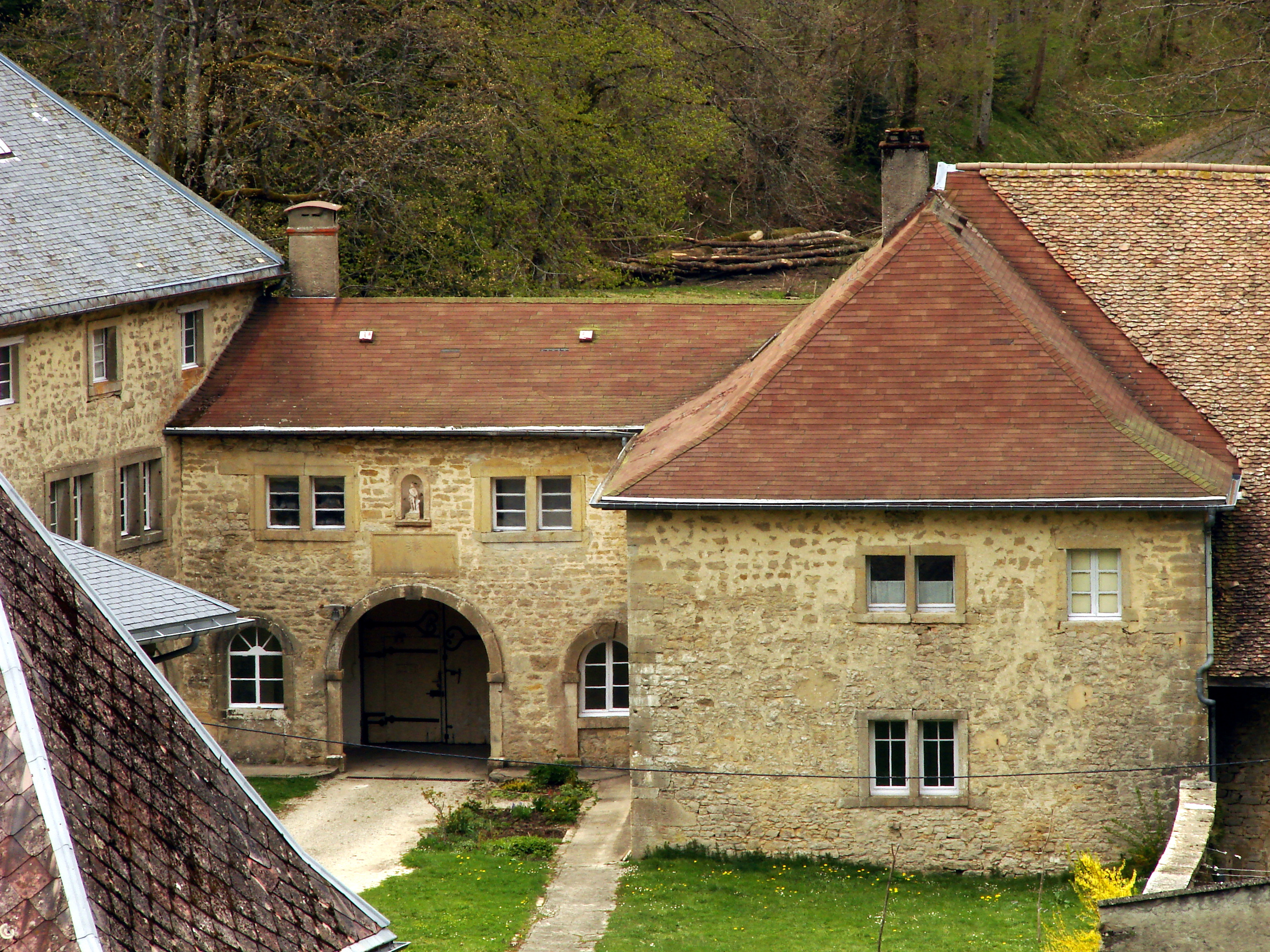 Vue des bâtiments de la chartreuse de Portes